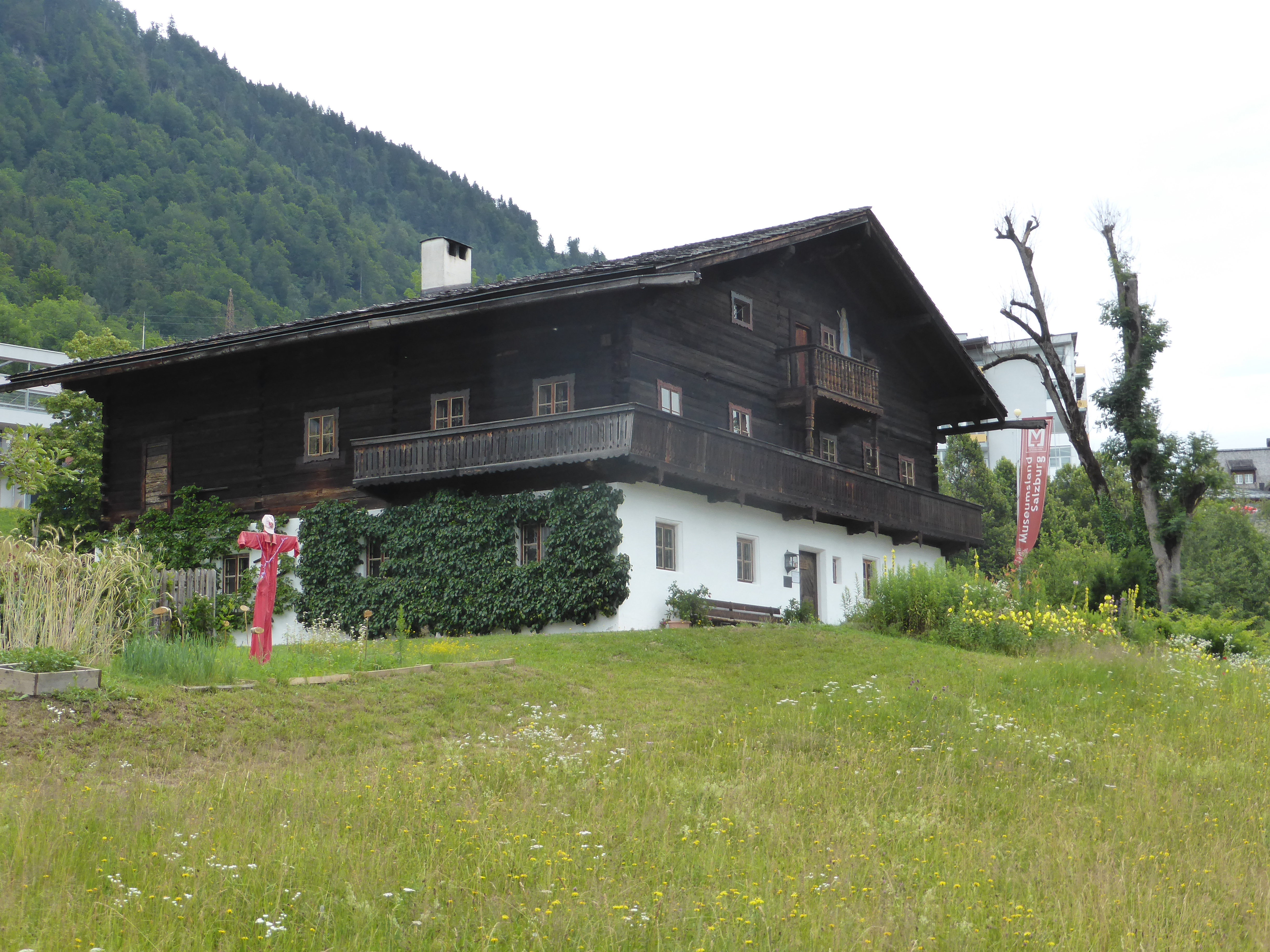 Bauernhaus, Heimatmuseum; Wallnergut